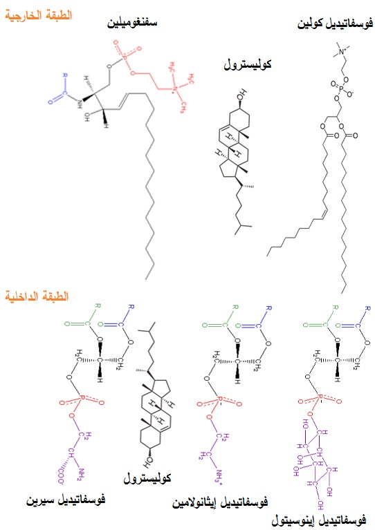 الشحوم الأكثر شيوعاً في غشاء كرية الدم الحمراء